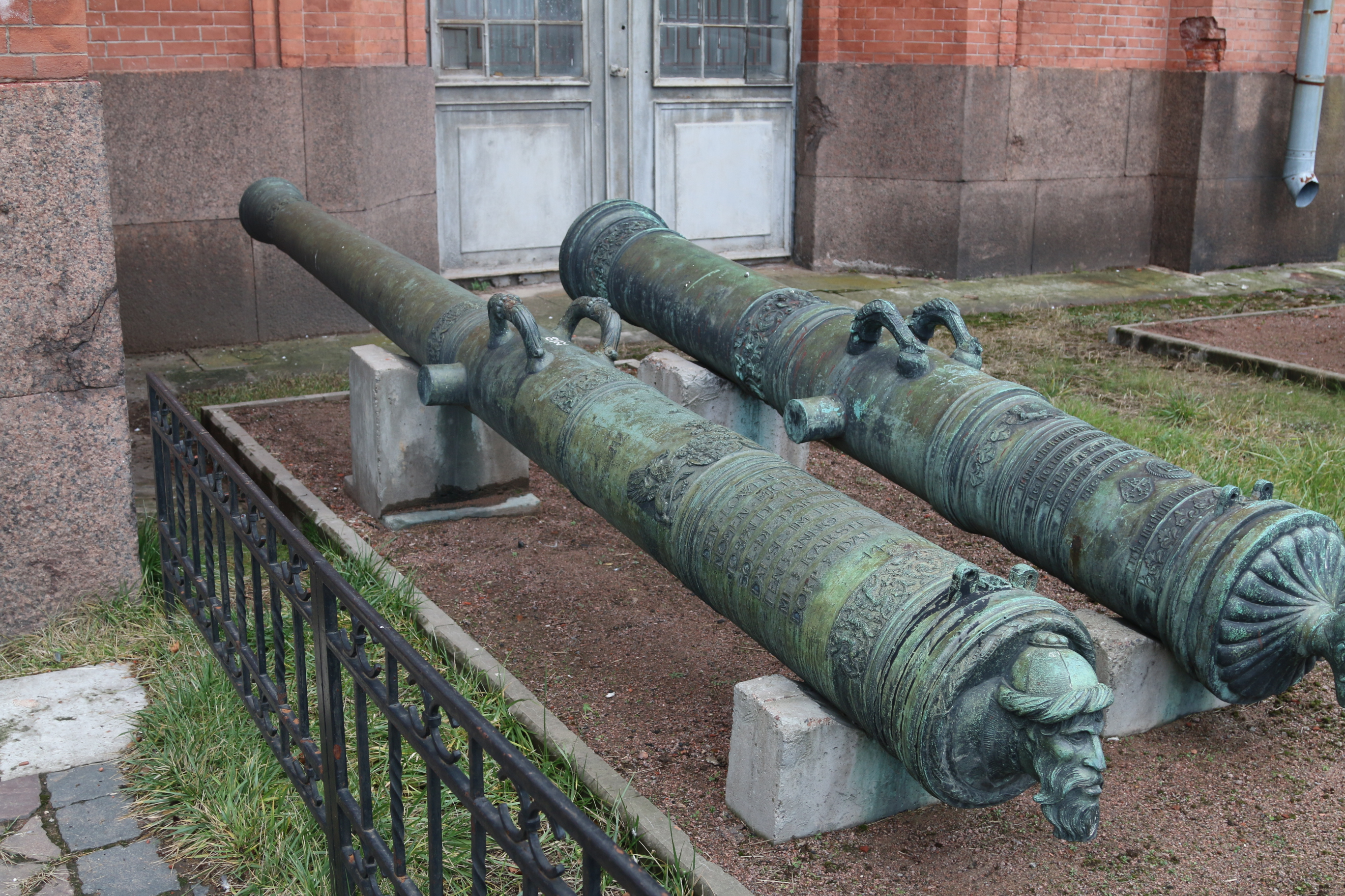 Ствол 9-фунтовой (108 мм) пушки "Ревельский лев". Бронзовый, масса 2375 кг. Отлит в 1559 году в Ревеле.